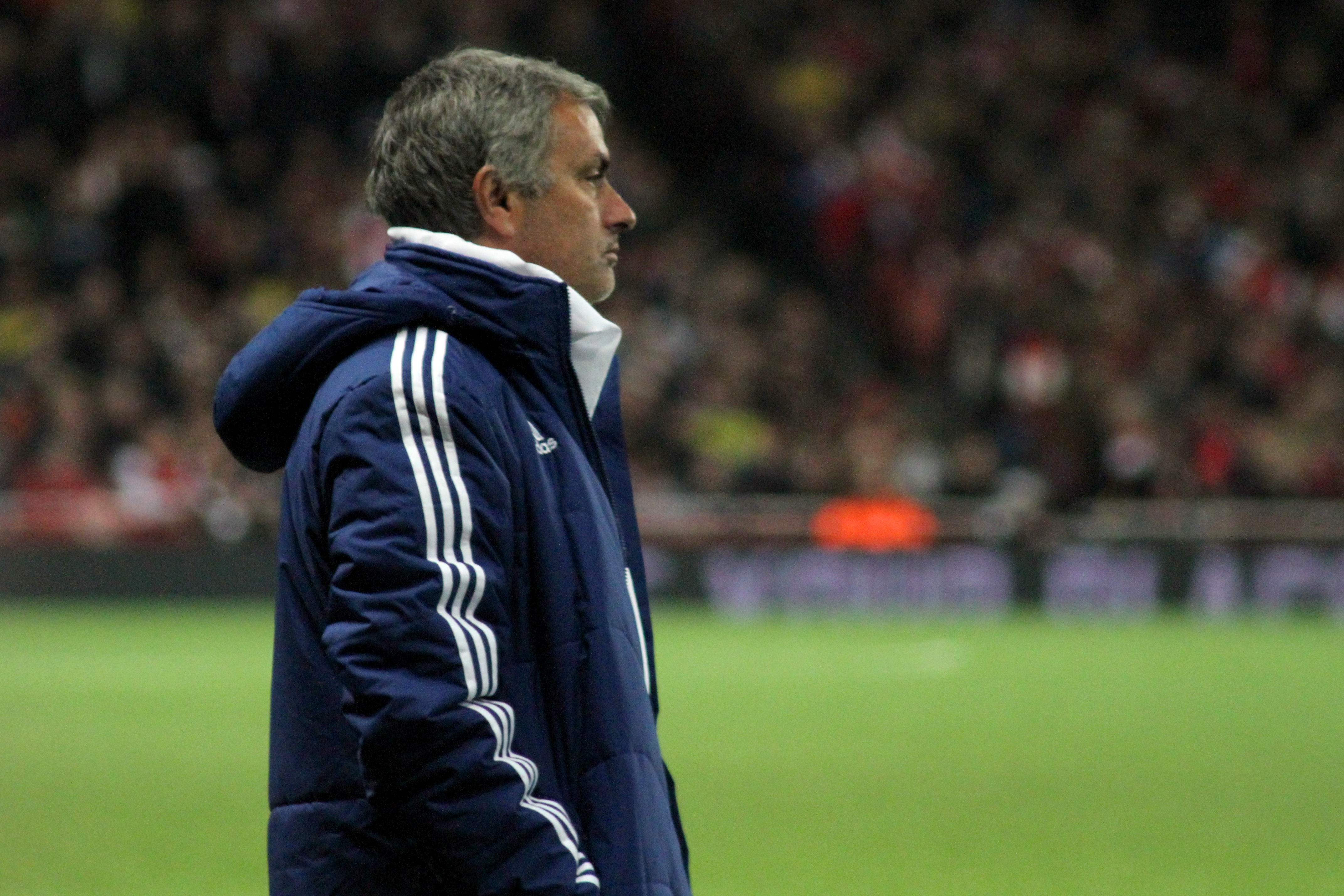 Jose Mourinho